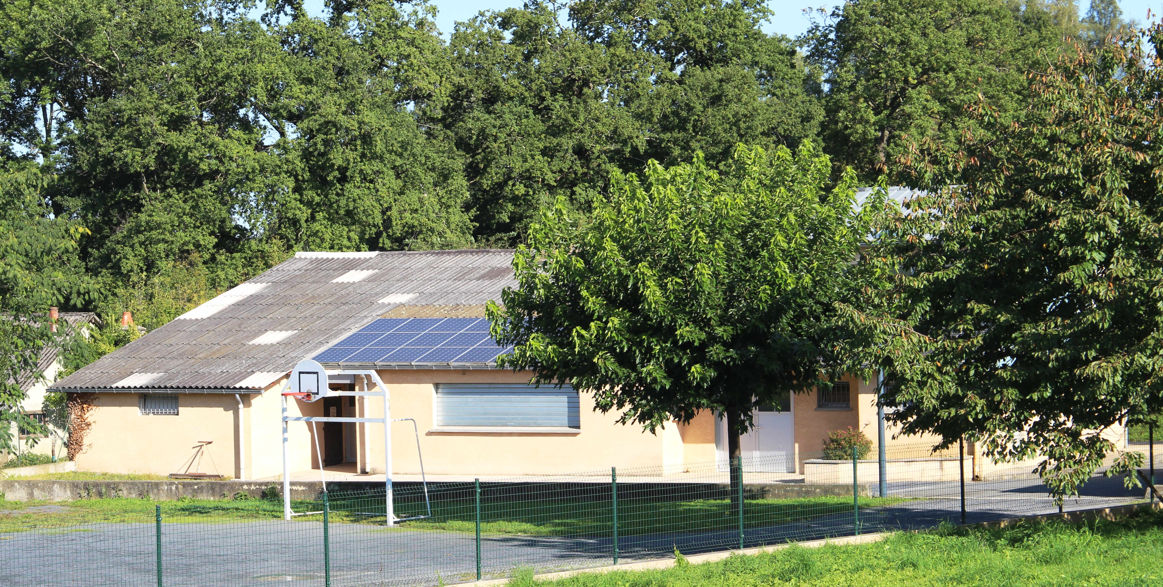 Salle des fêtes de Loucrup (Hautes-Pyrénées)